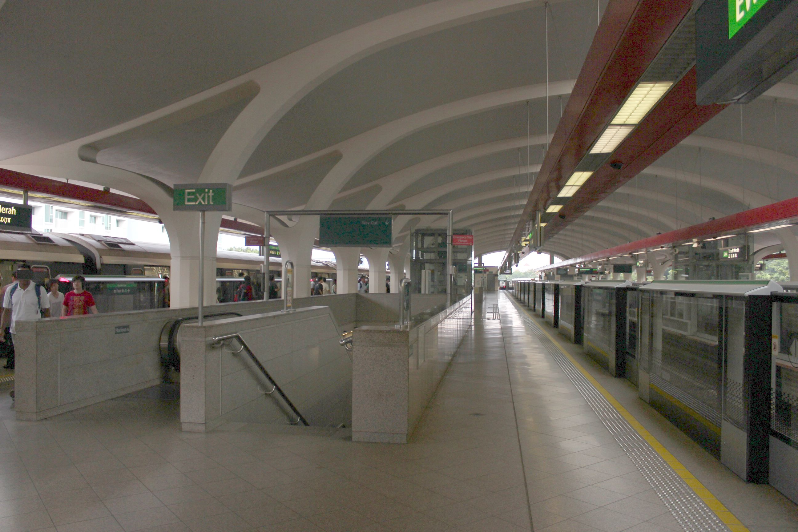 Tanah Merah MRT Station Platform